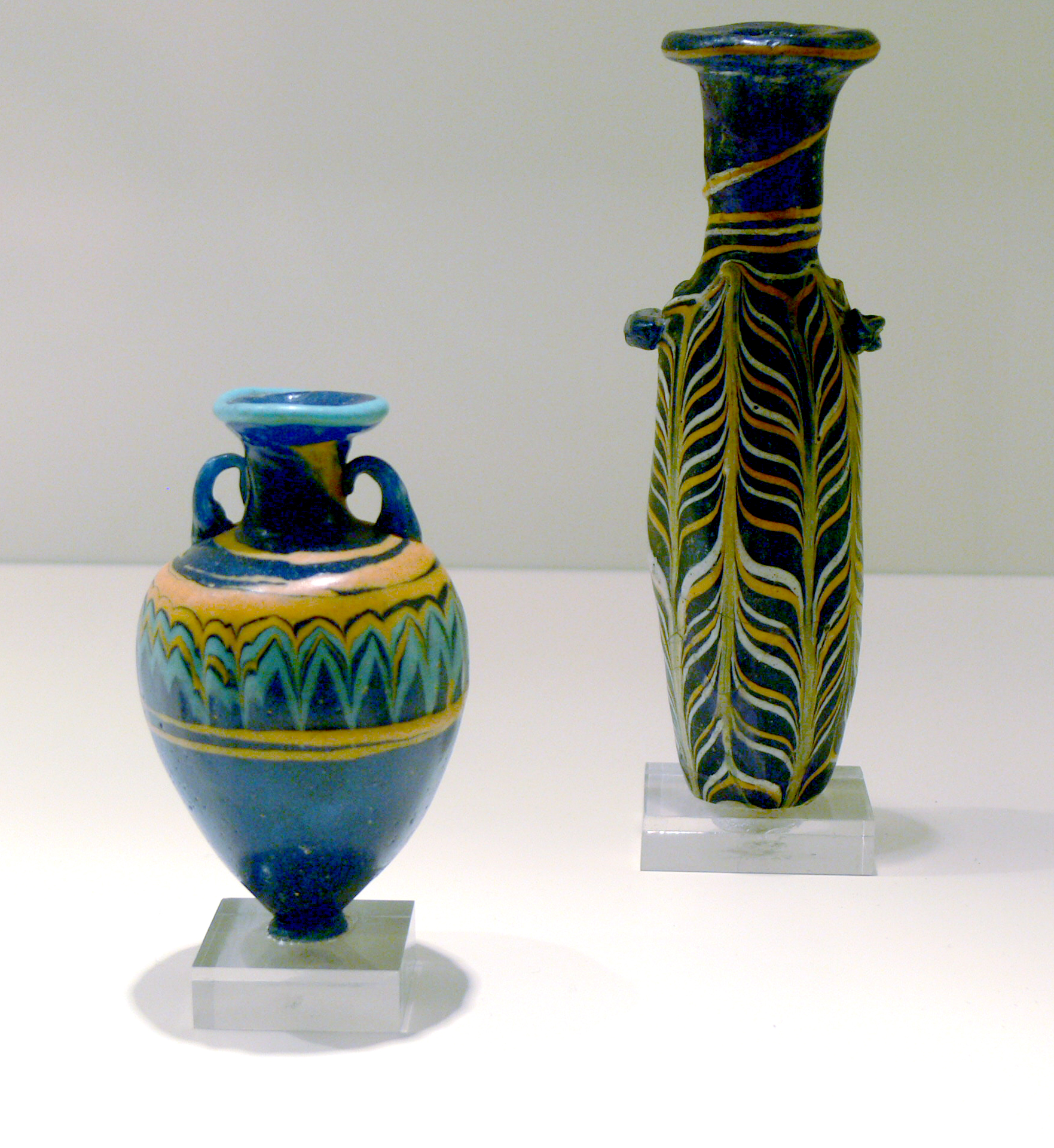 Est de la Méditerannée (5-4e et 4-3e s. av. J.-C.). Düsseldorf, Museum kunst Palast